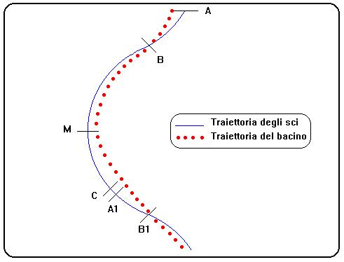 La curva